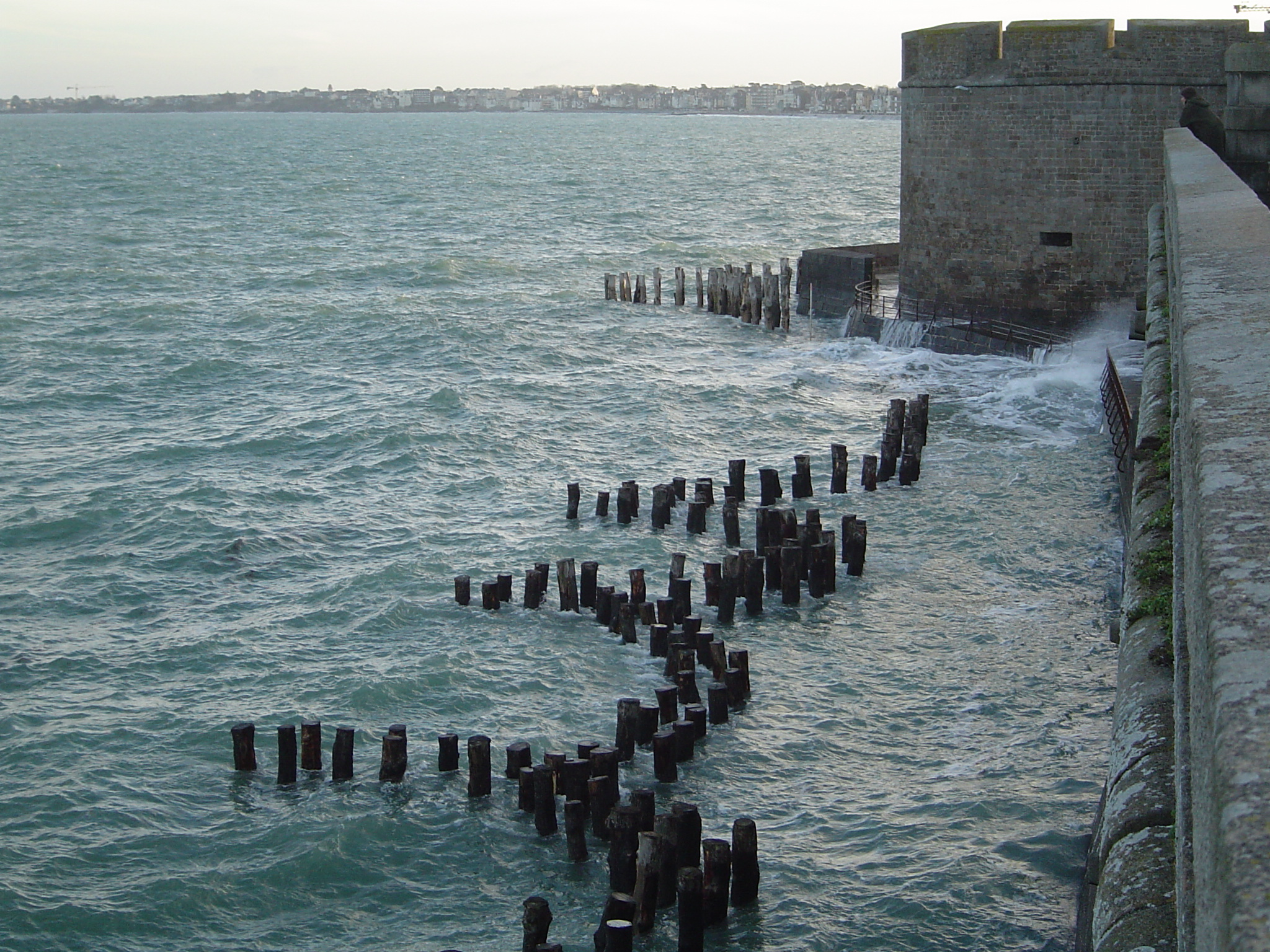 Plage de l'Éventail à Saint-Malo par grande marée (coefficient 106).